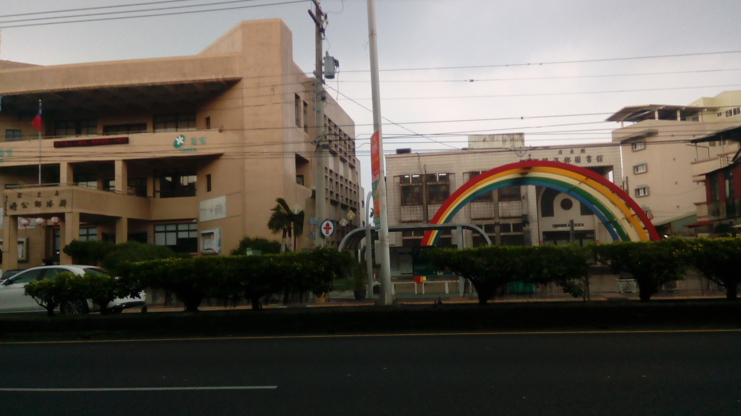 台一線上